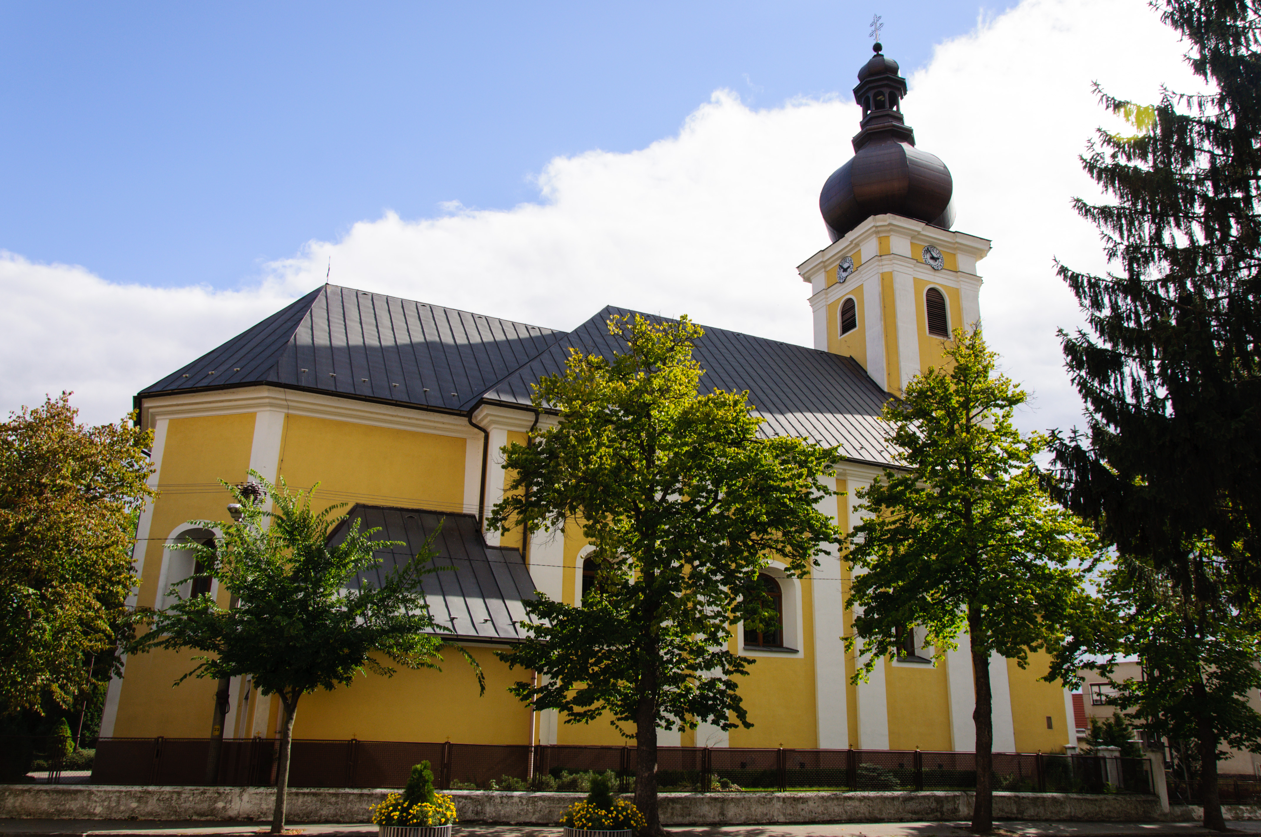 Kostol svätého Michala Archanjela (Nemšová)